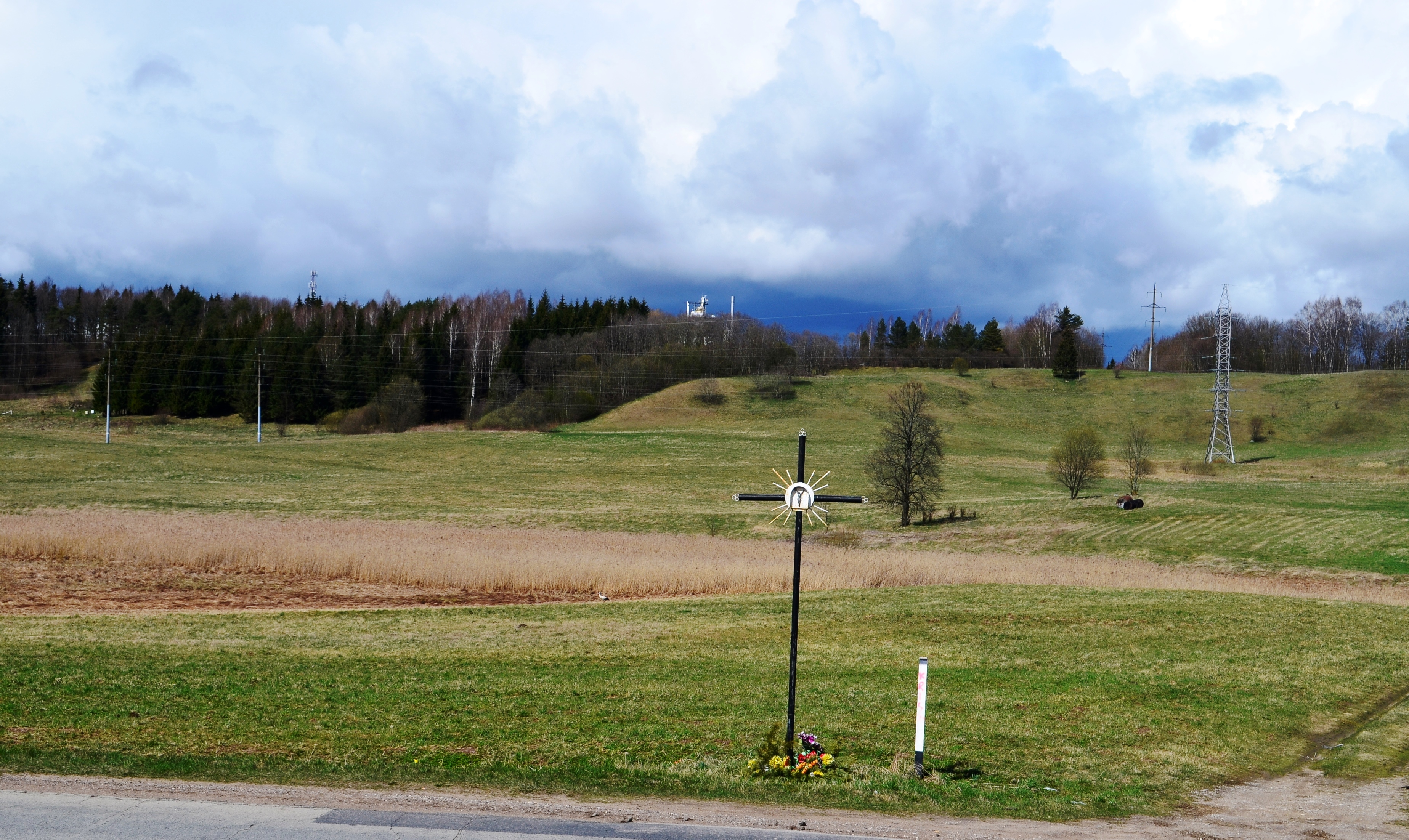 Kryžius, Žem. Rusokų k., Vilniaus raj.